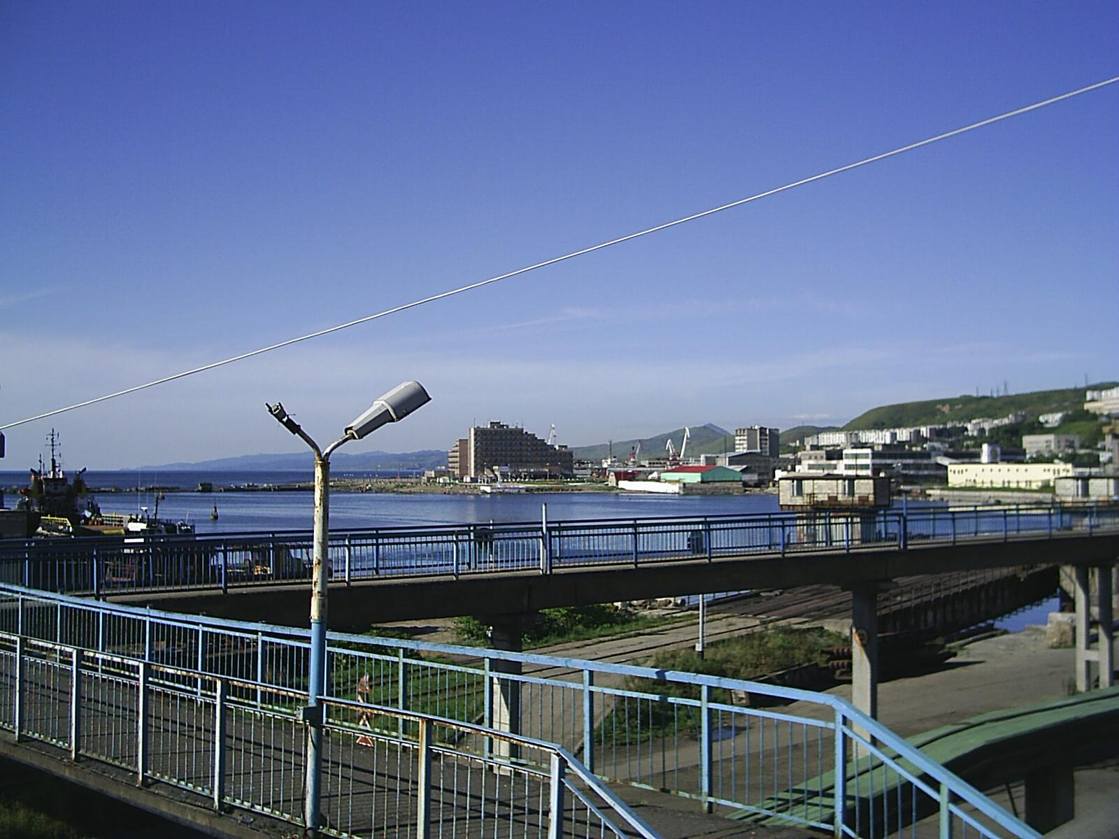 Снимок 2006 г.